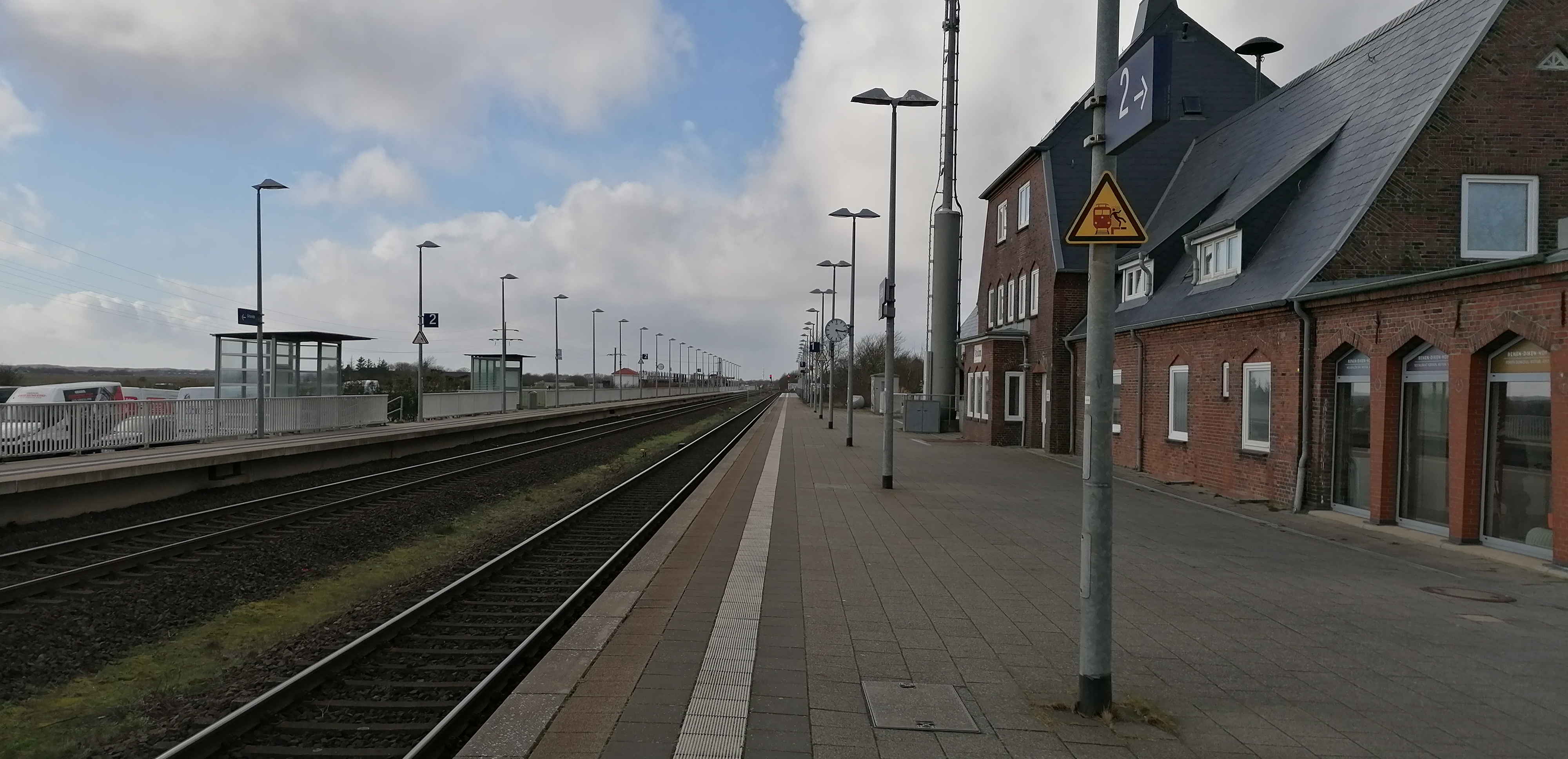 Bahnhof Keitum, Blick Richtung Westerland, Taken on 25 February 2020